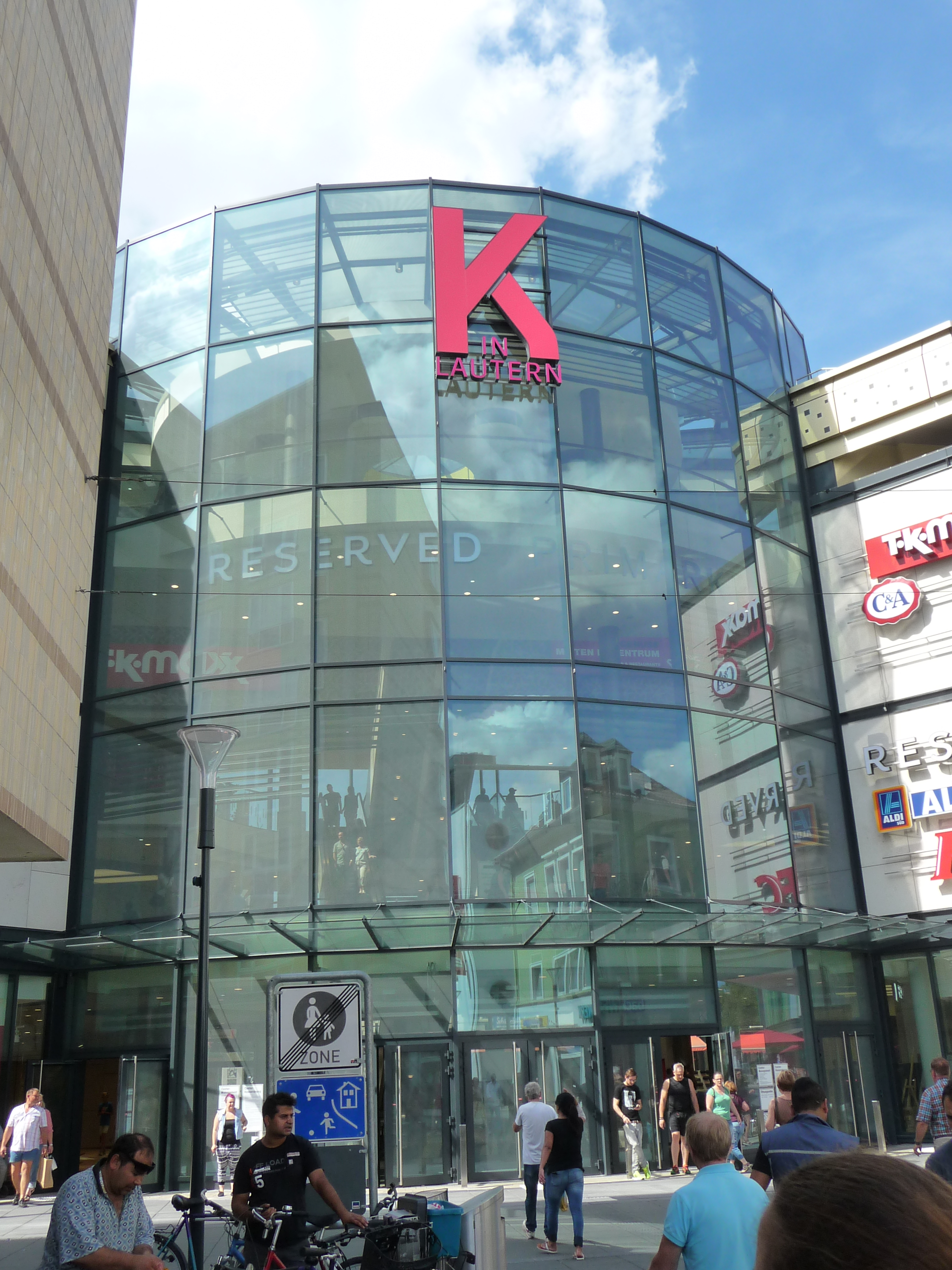 K in Lautern